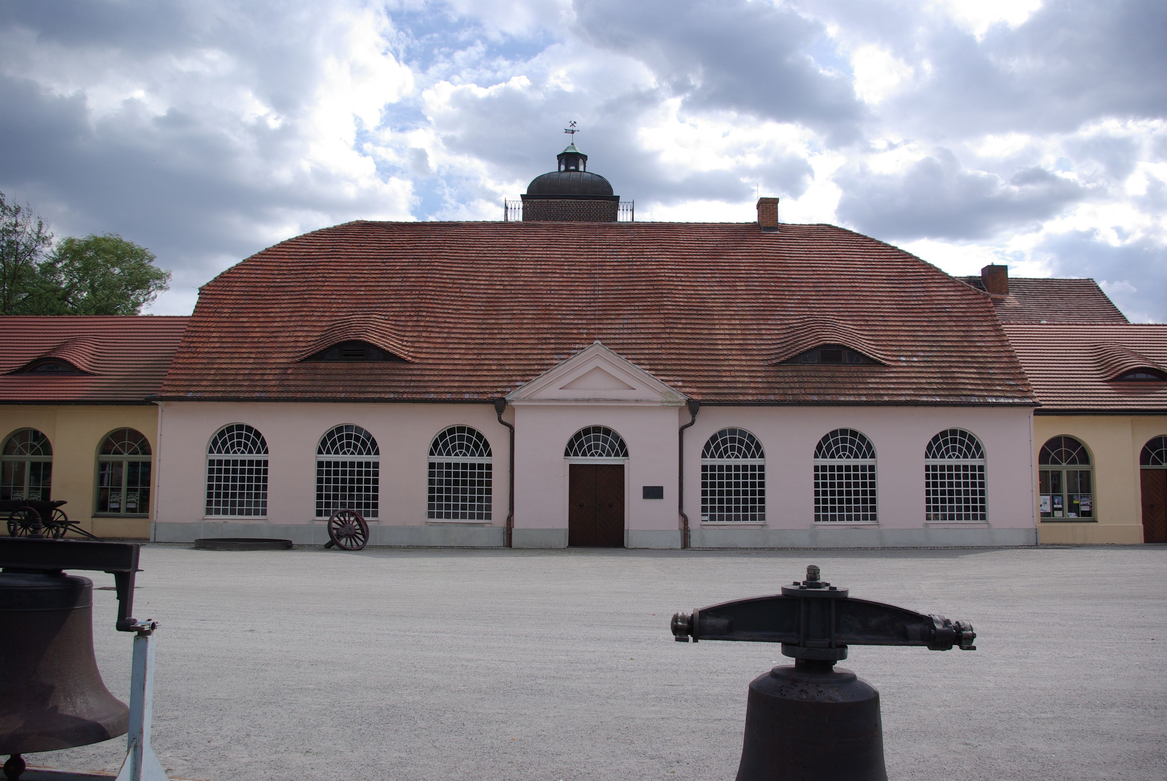 Peitz in Brandenburg. Das ehemalige Eisenhüttenwerk wurde im 16. Jahrhundert angelegt. Die heutigen Gebäude wurden 1810 errichtet. Sie stehen unter Denkmalschutz.